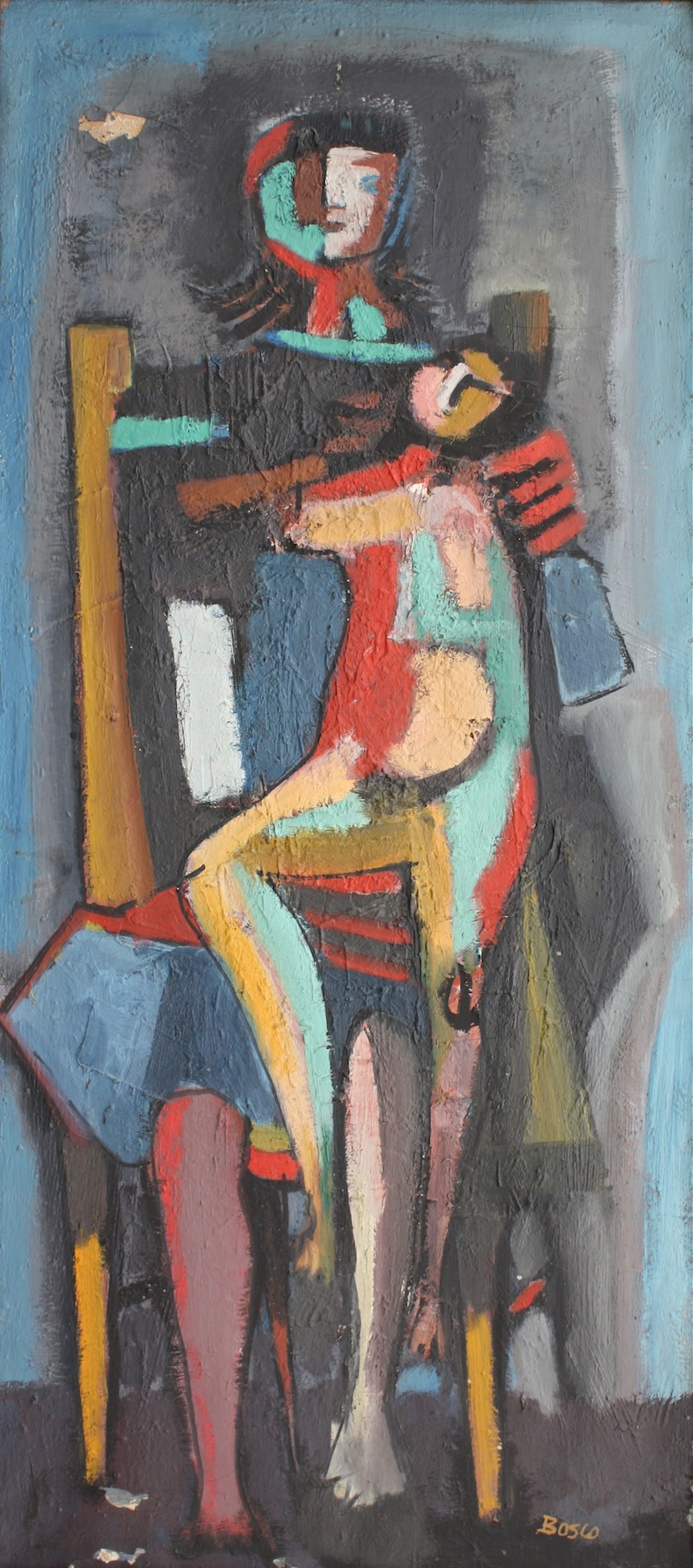 La Mère et l’enfant, 1945, h-t, 115 x 51 cm